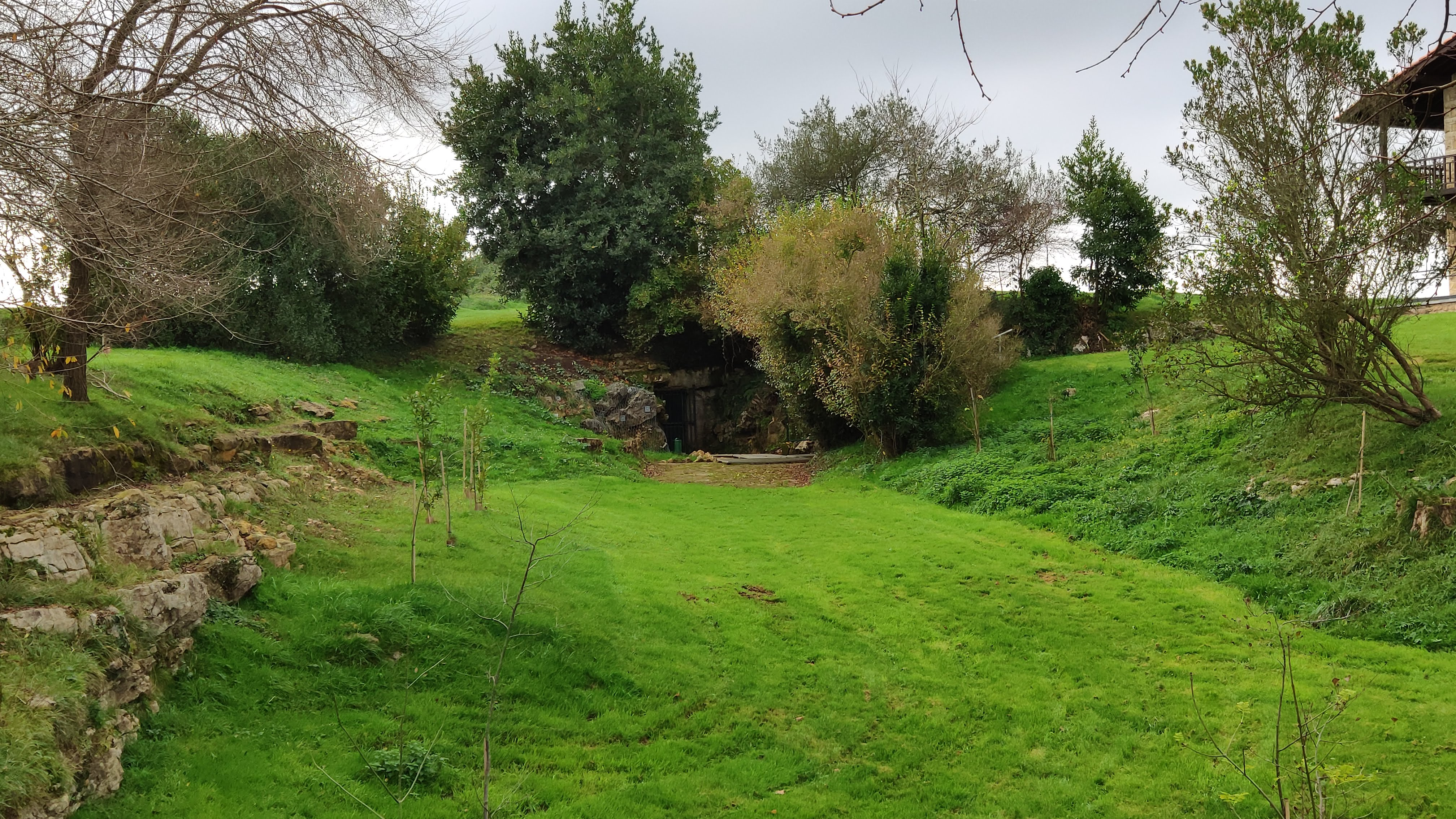 Entrada a la cueva de Altamira, Santillana del Mar